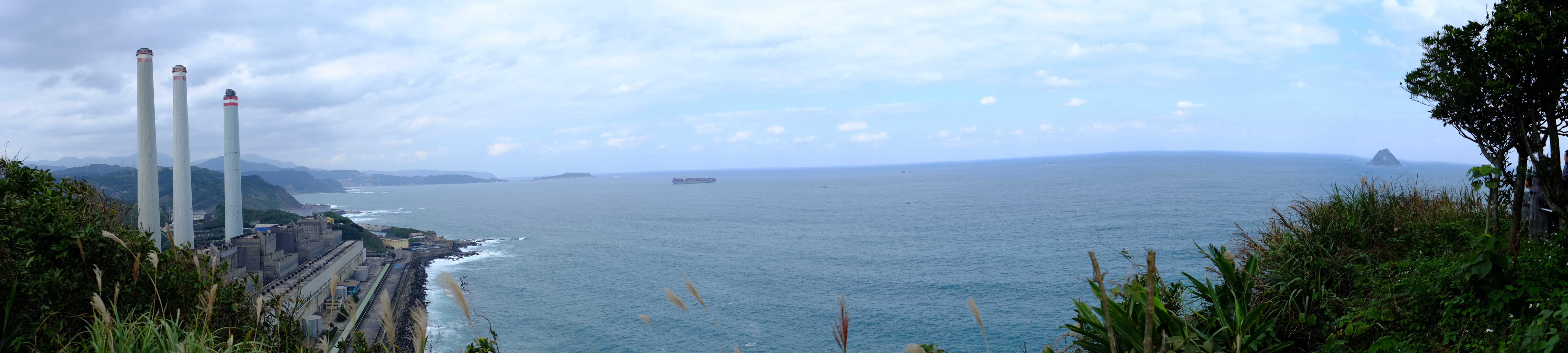 白米甕砲台展望